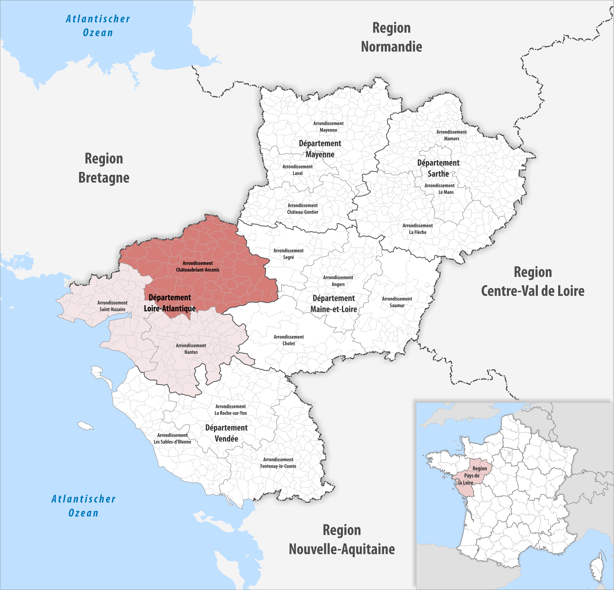 Lage des Arrondissements Châteaubriant-Ancenis